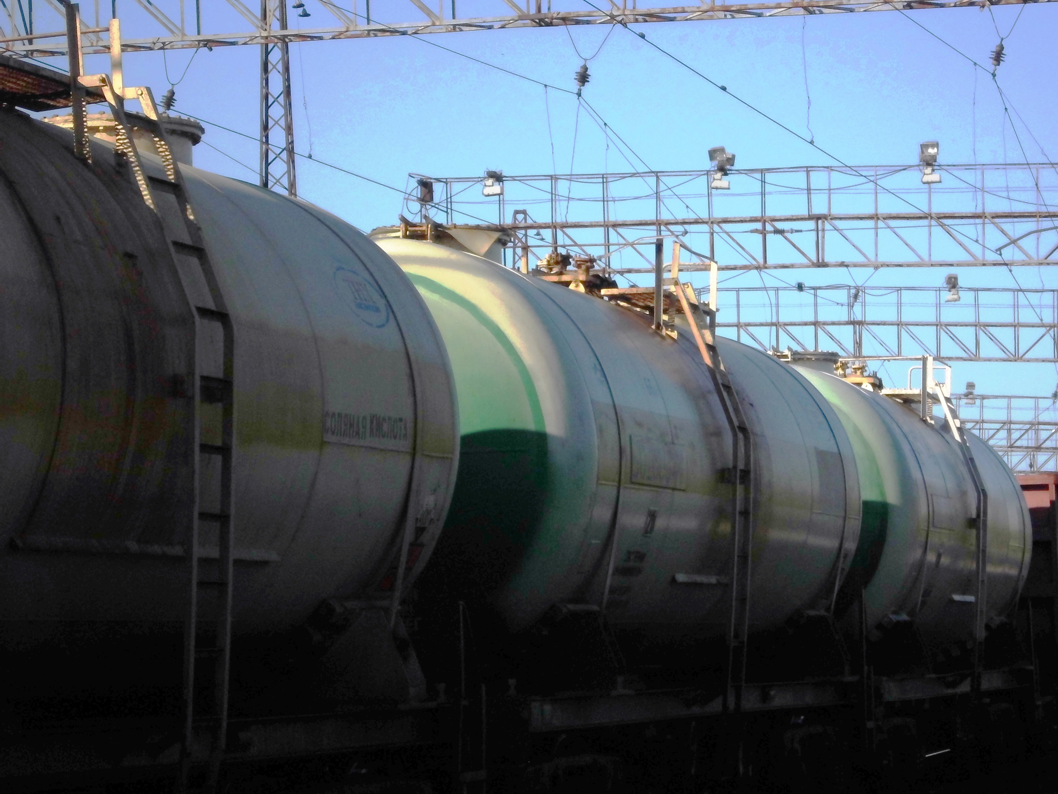 4-х осный вагон-цистерна для соляной кислоты с бронелистом. Россия.